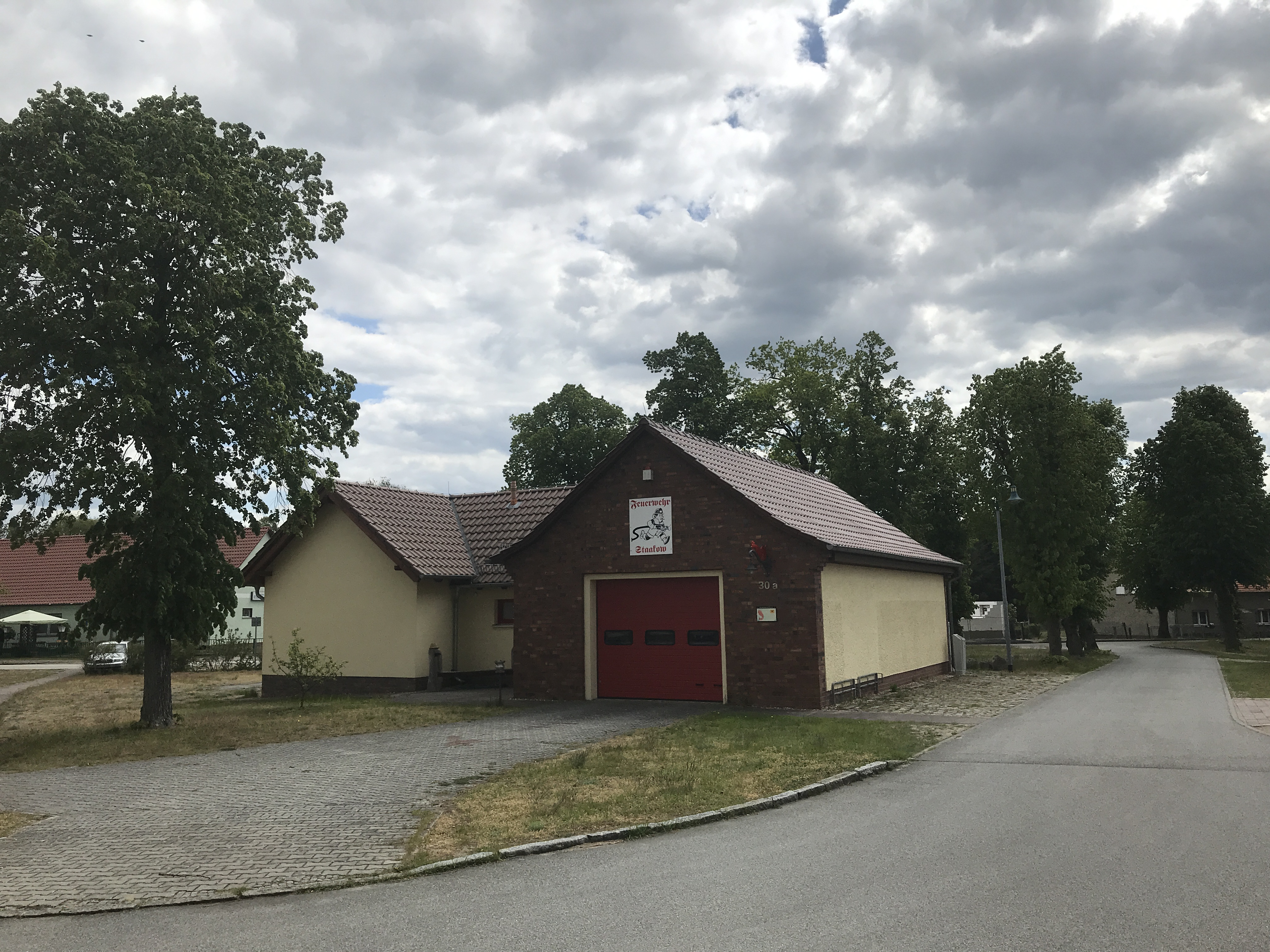 Staakow, ein Ortsteil von Rietzneuendorf-Staakow in Brandenburg